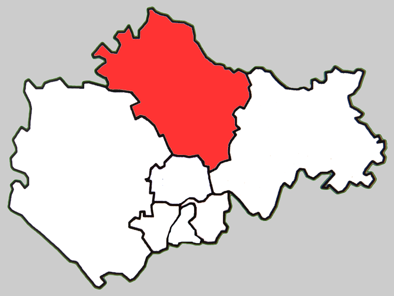 蚌埠市固镇县地图